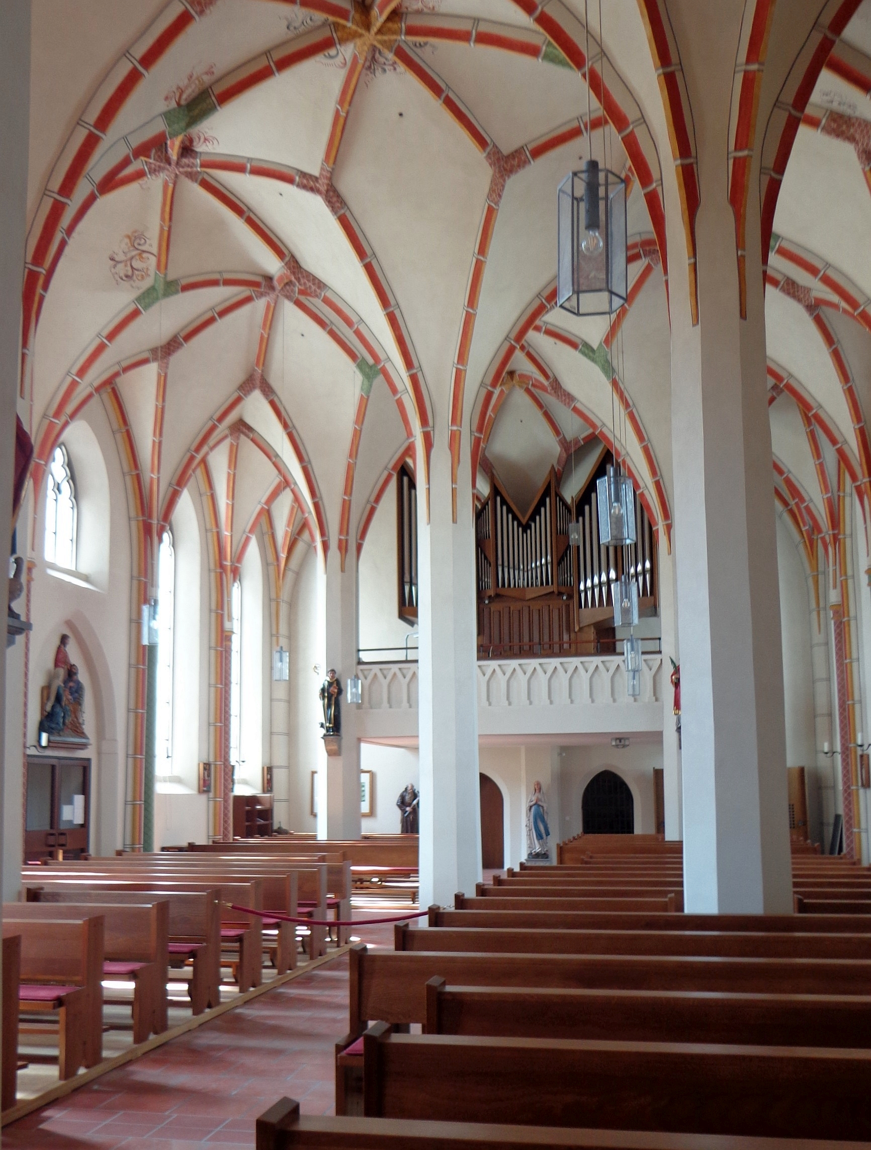 Pfarrkirche Tettenweis, Niederbayern: Blick zur Orgelempore